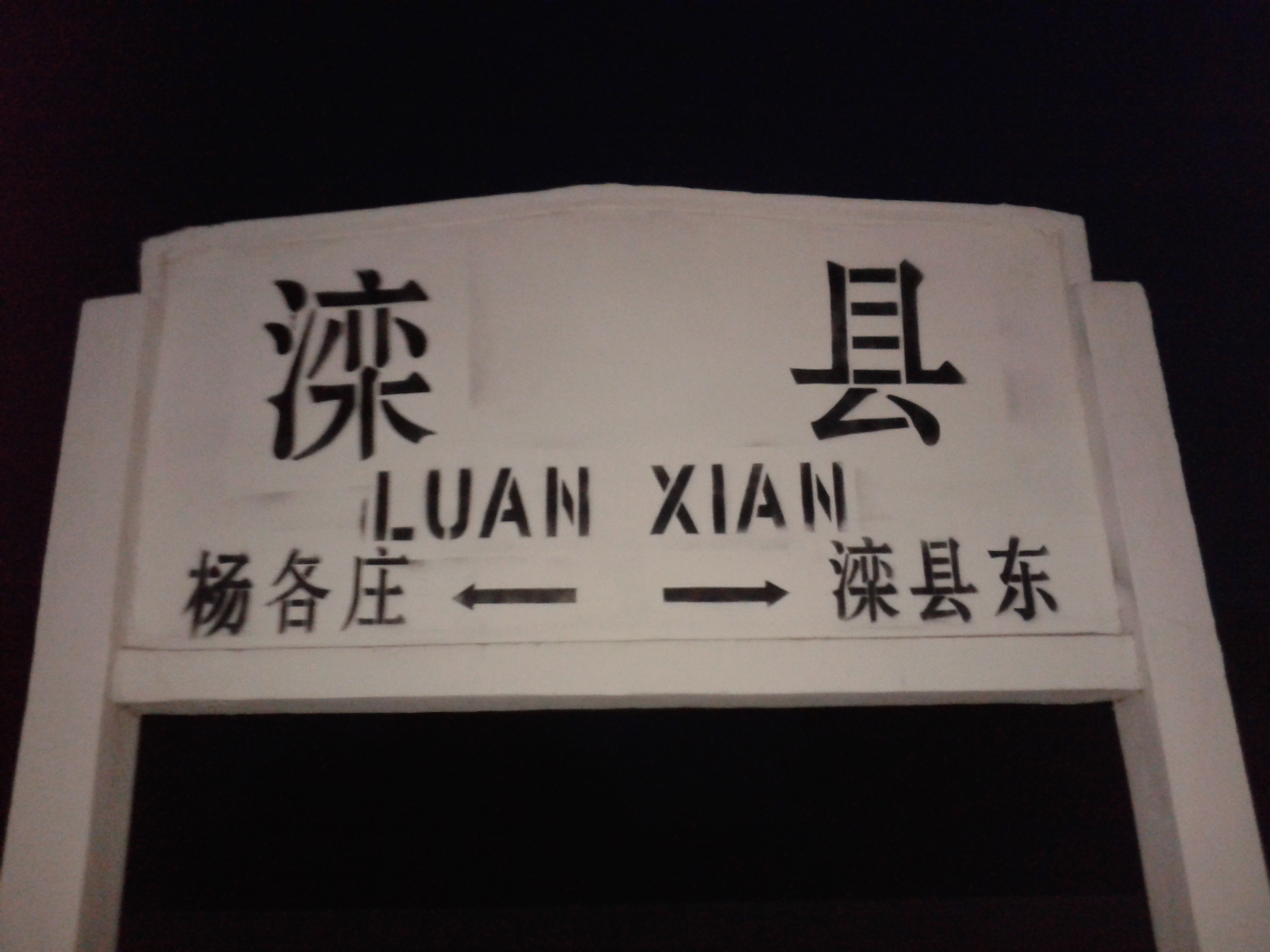 滦县站站牌